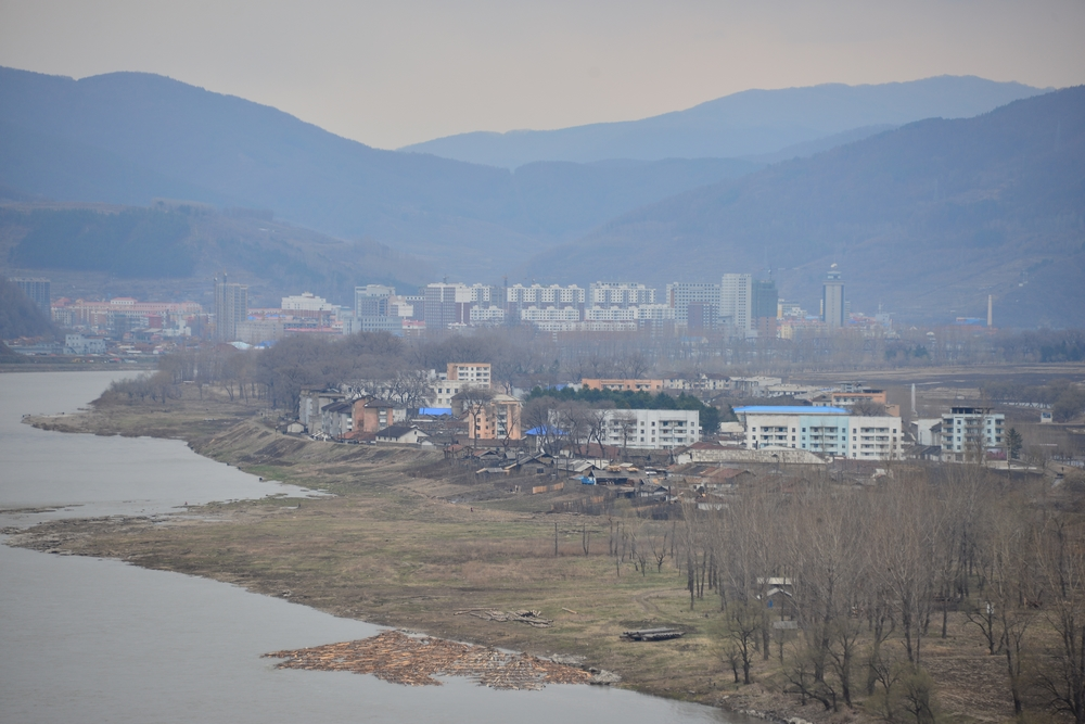 望江楼上看中江和临江